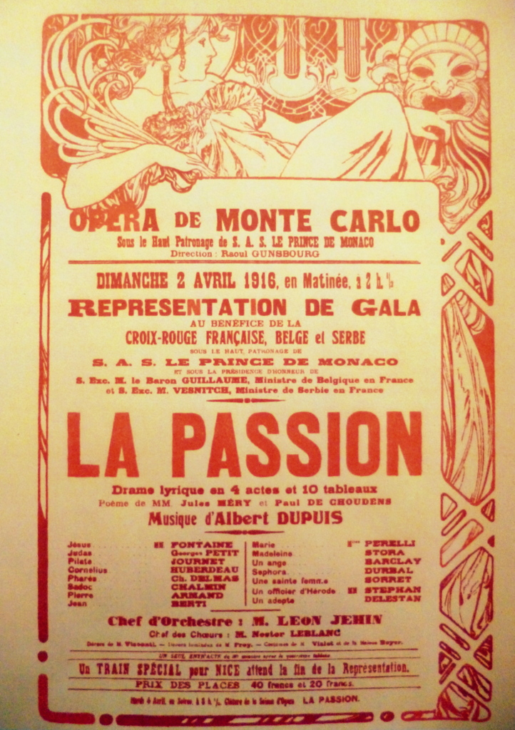 Affiche de la première de l'opéra en 1916